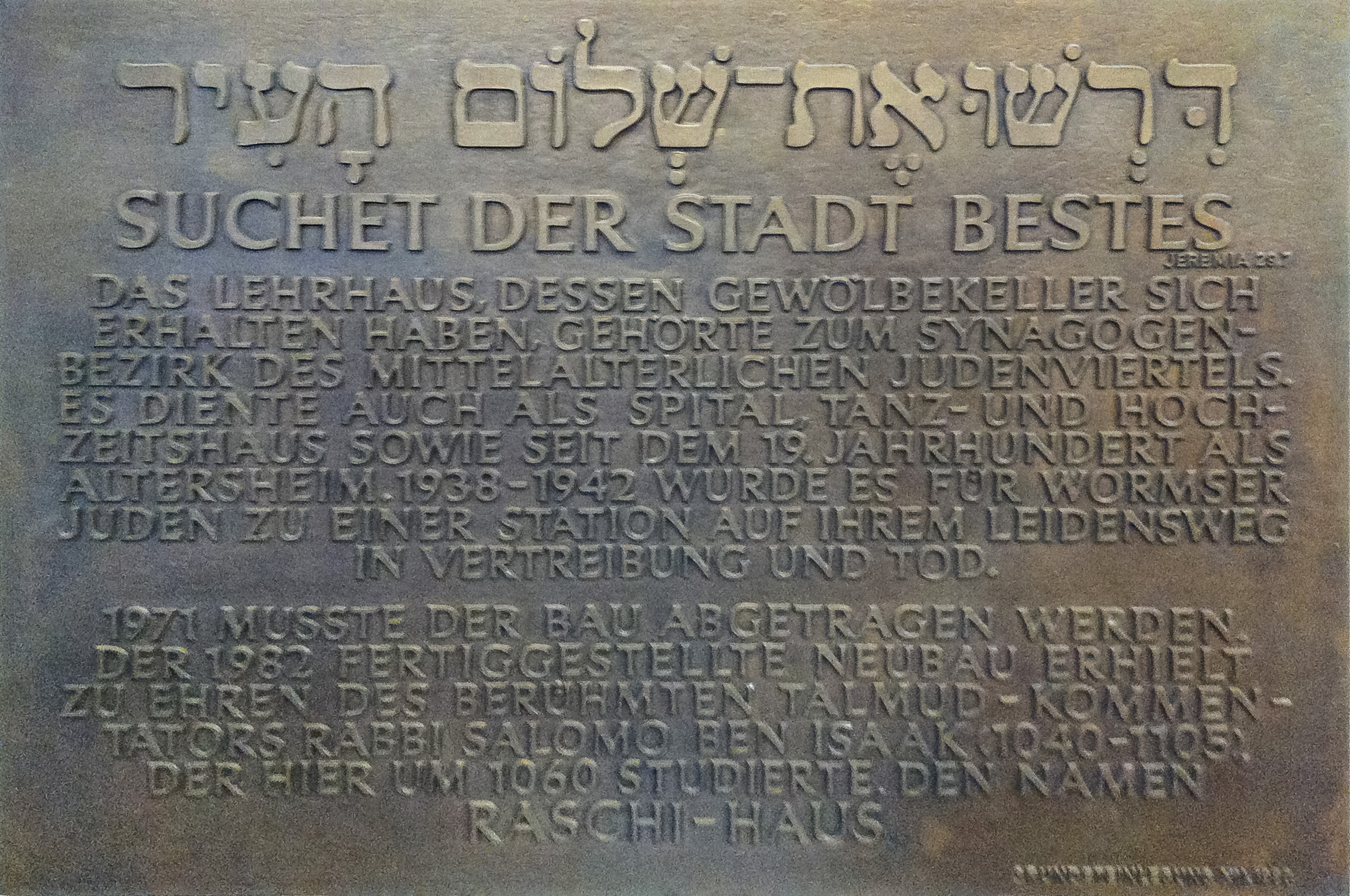 Gedenktafel zur Grundsteinlegung des Rasch-Hauses.